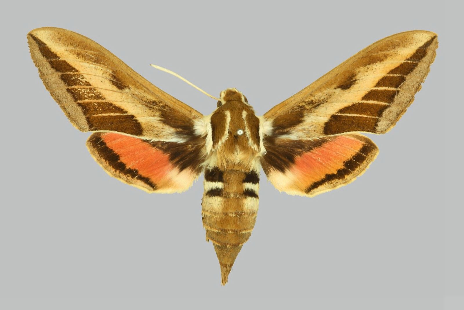 Hyles nervosa, female, upperside. India, Khariagali